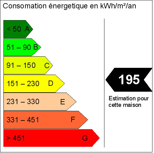 Illustration de l'echelle graphique de la performance énergetique des bâtiments